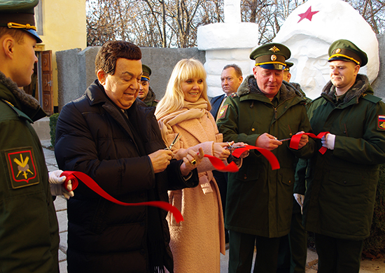 Народный артист СССР Иосиф Кобзон и народная артистка Российской Федерации Валерия открывают музей боевой славы в Оперативной группе российских войск в Приднестровской Молдавской Республике.